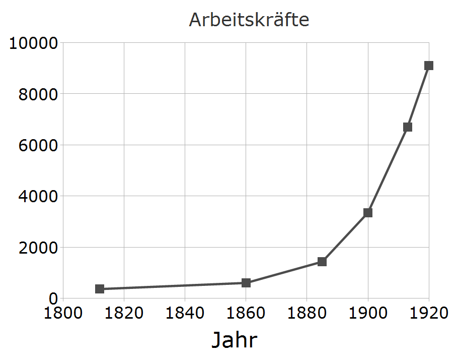 Entwicklung der Anzahl der Arbeitskräfte der Dillinger Hütte